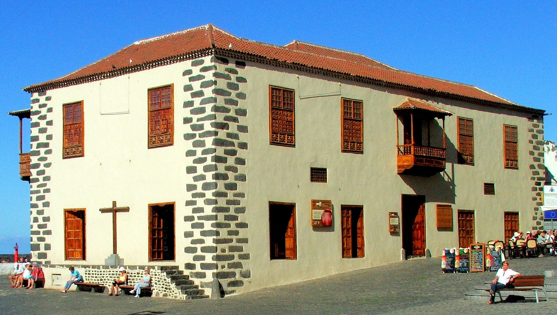 Puerto de la Cruz Casa Aduana